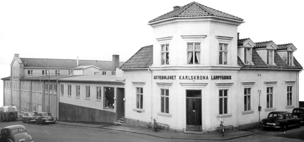 Karlskrona Lampfabriks huvudkontor 1955.